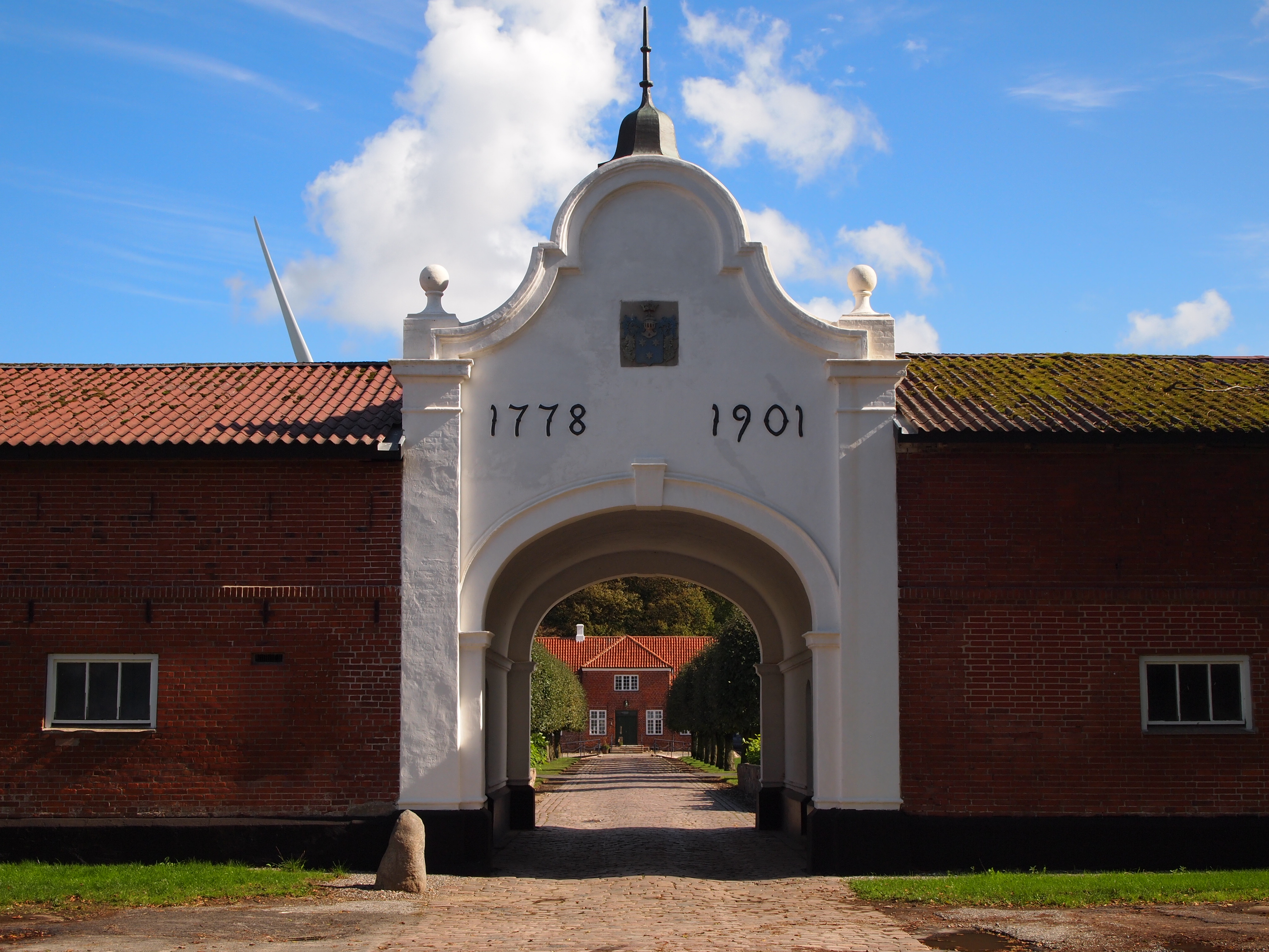 Avsumgård